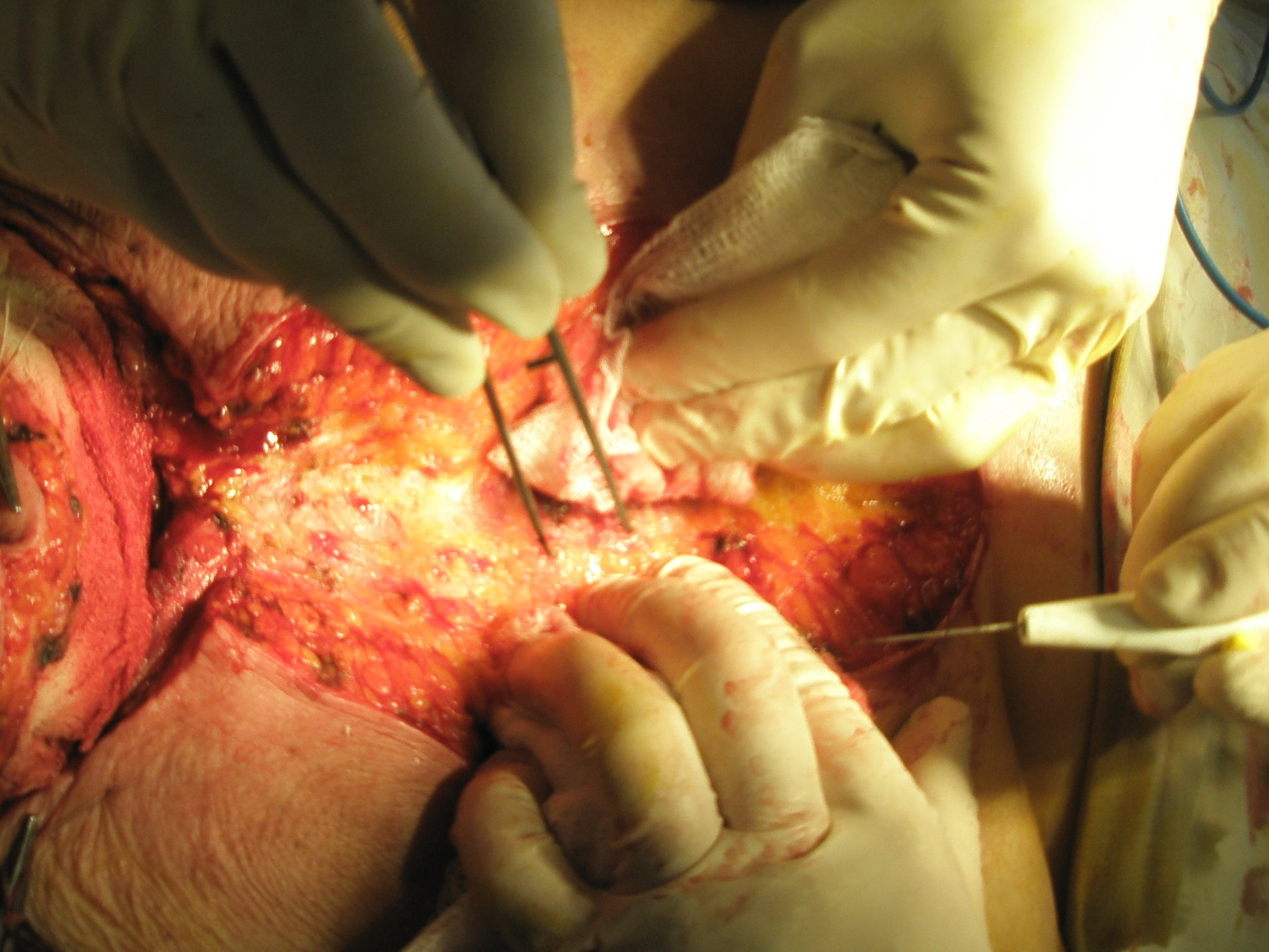 Полная продольная срединная стернотомия по поводу загрудинного зоба. Разрез кожи.